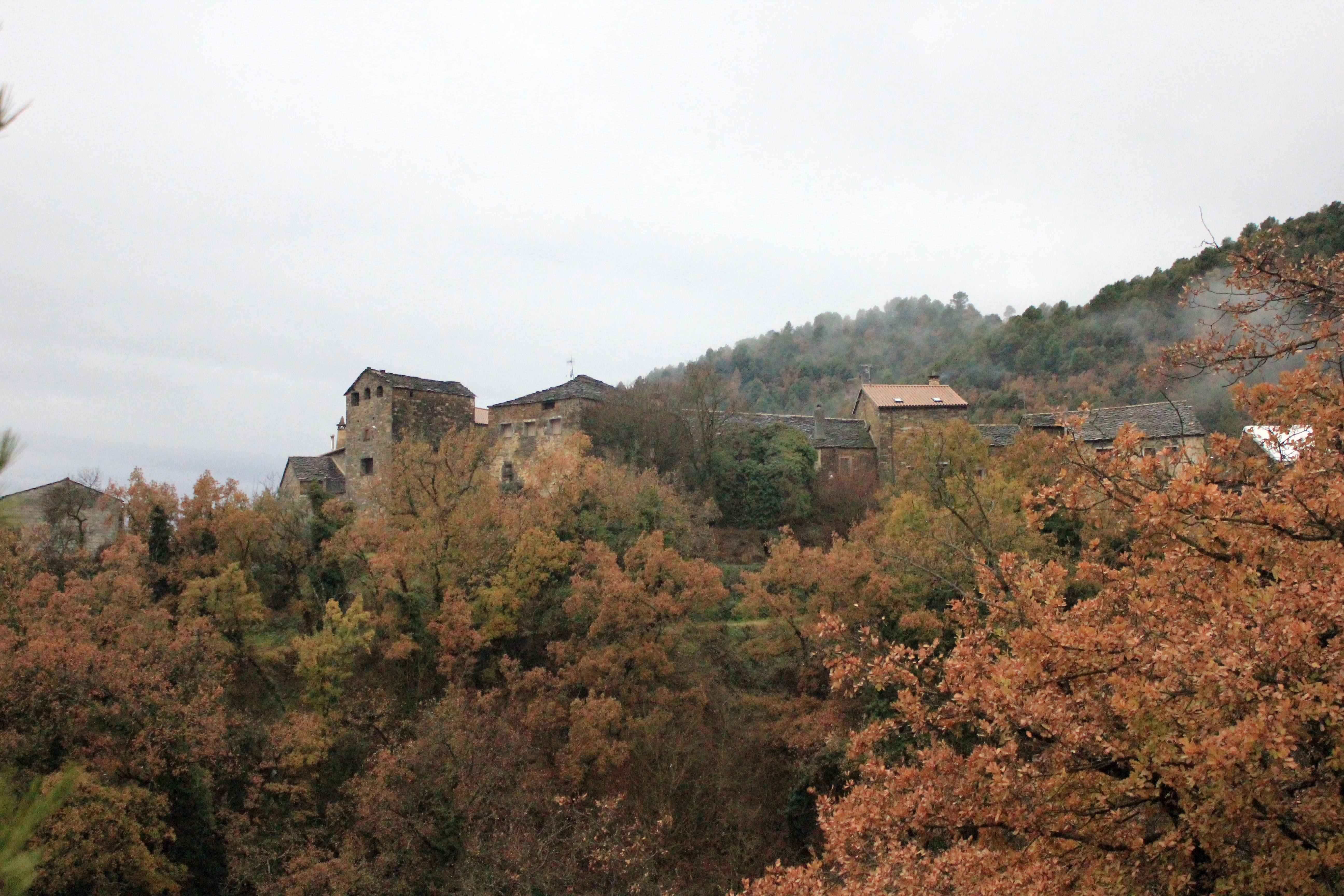 Aragonés: Anvista cheneral de Charo (A Fueva)